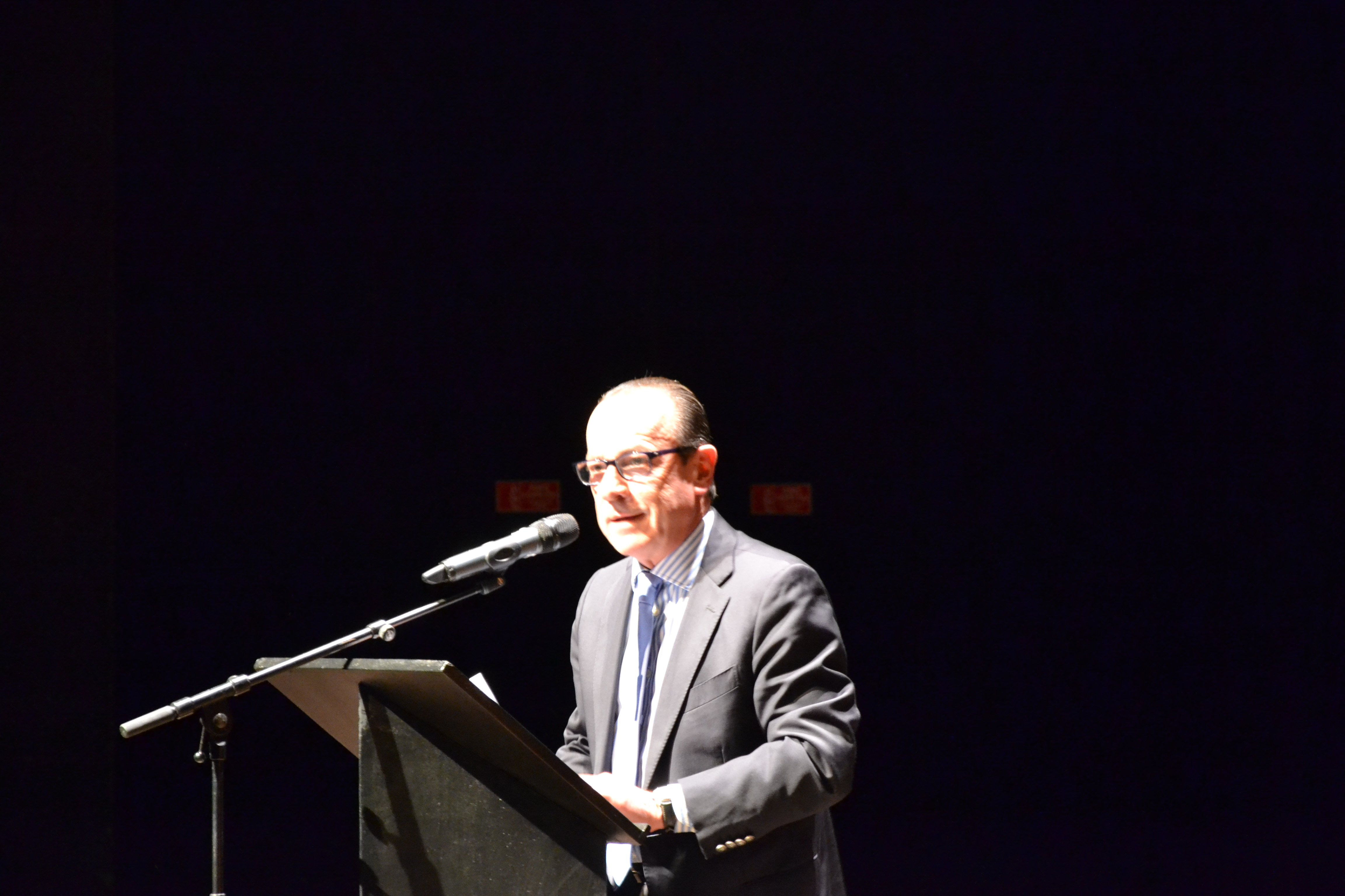 Jean-Marc Roubaud lors de la conférence de presse du Festival d'Avignon 2016 à la FaBricA